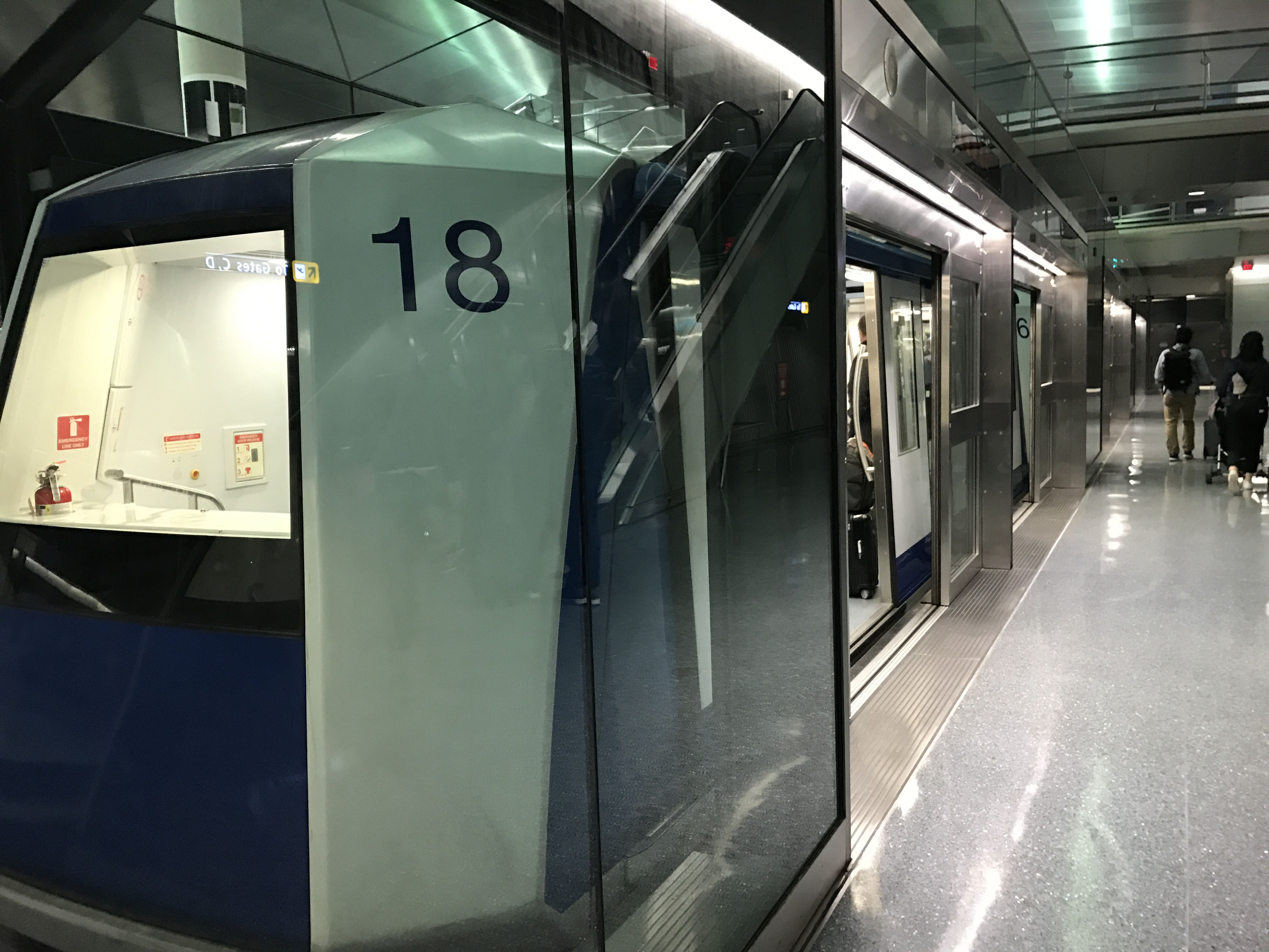 Tren interterminales en el Aeropuerto Internacional de Washington Dulles.